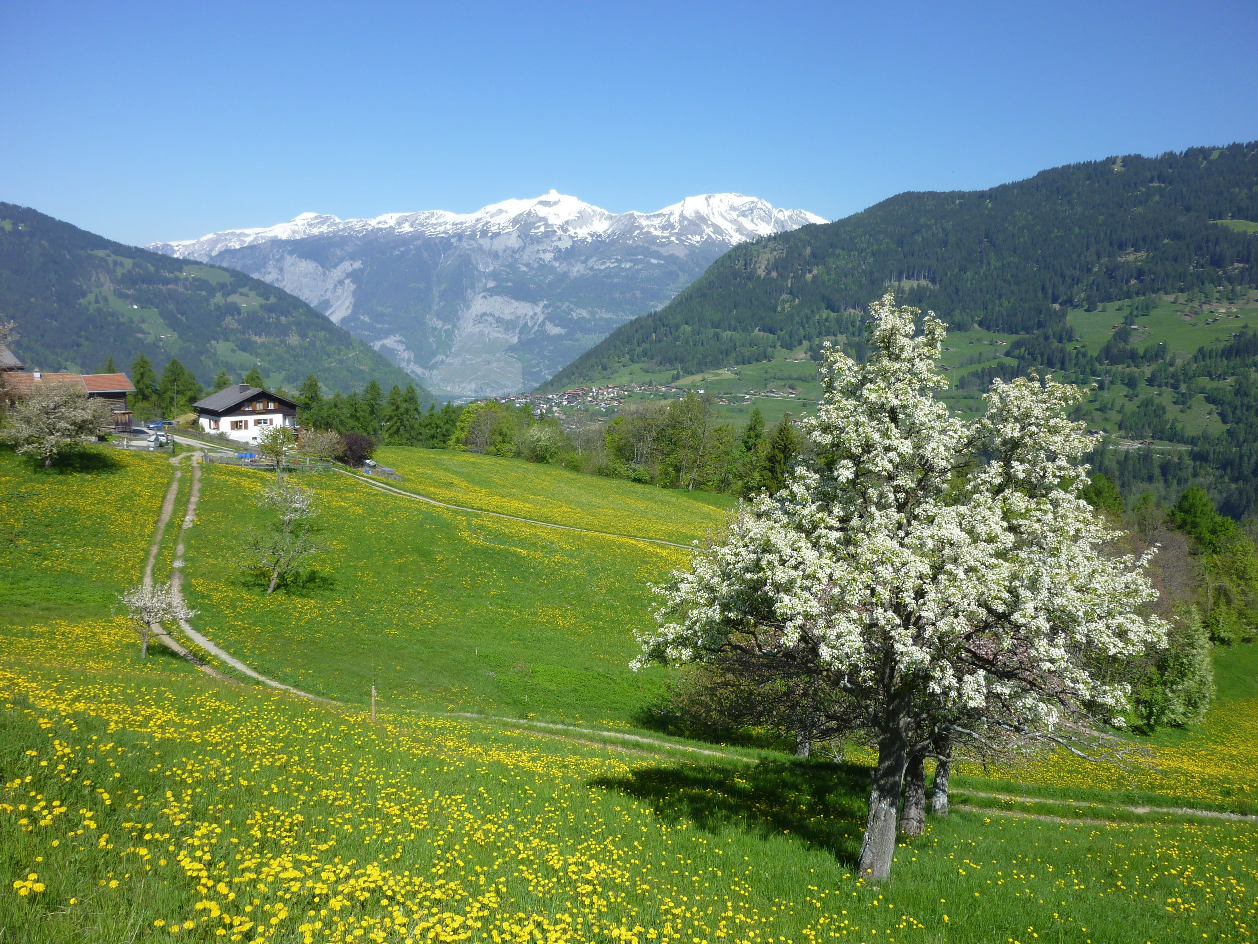 Tschiertschen-Praden. Blick nach Norden zum Calanda; im Hintergrund das Dorf Maladers